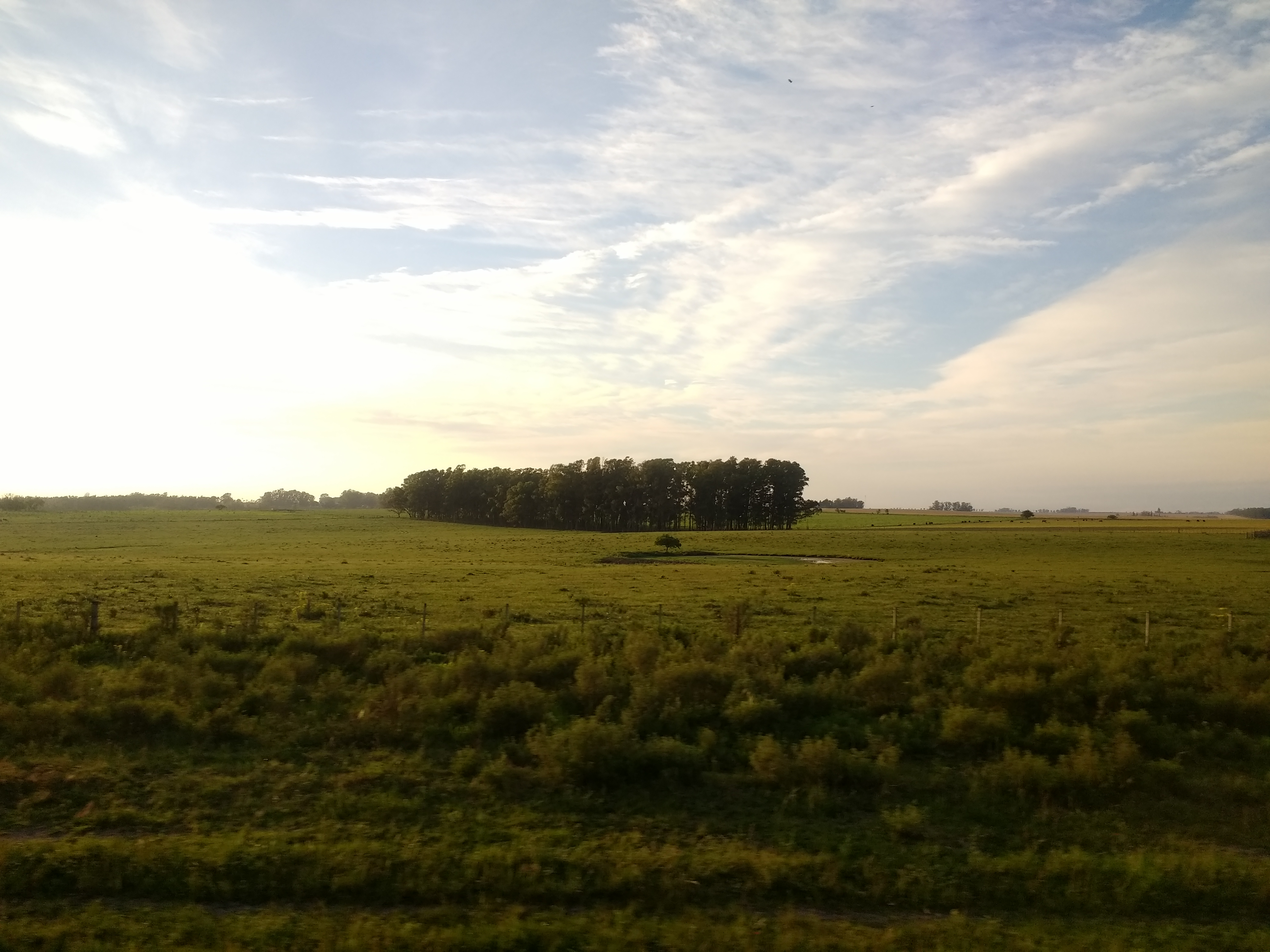 Paisaje del departamento de Flores, Uruguay.